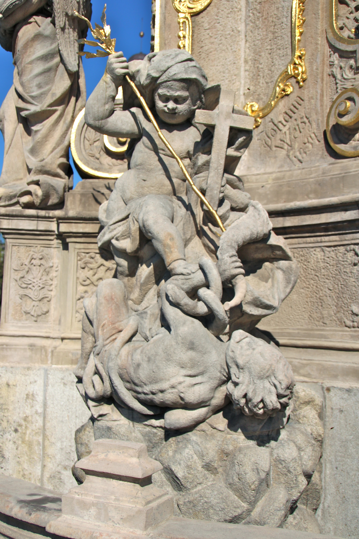 Głubczyce - miasto w Polsce położona w województwie opolskim, w powiecie głubczyckim.